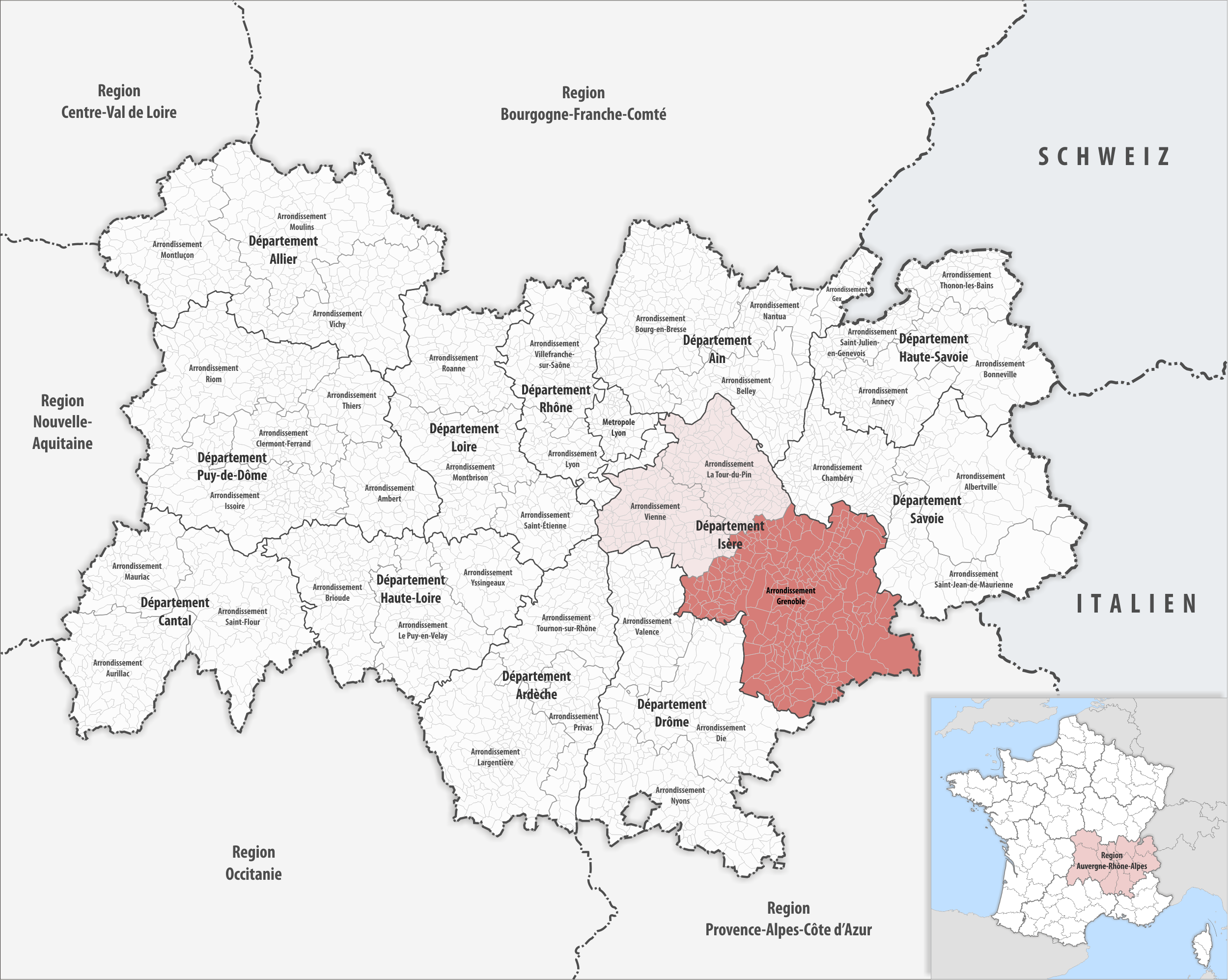 Lage des Arrondissements Grenoble